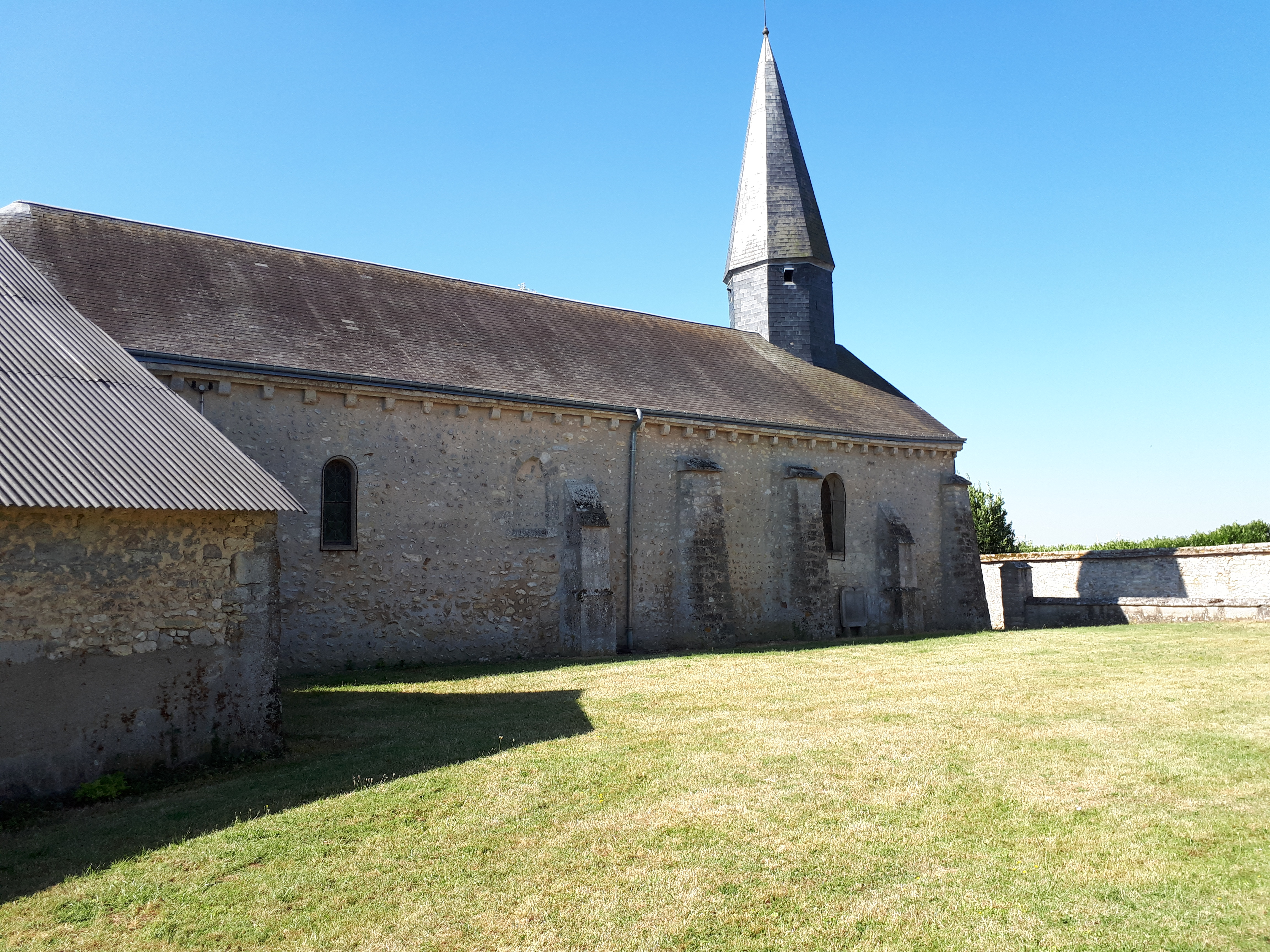 Église de Mondonville-Saint-Jean.